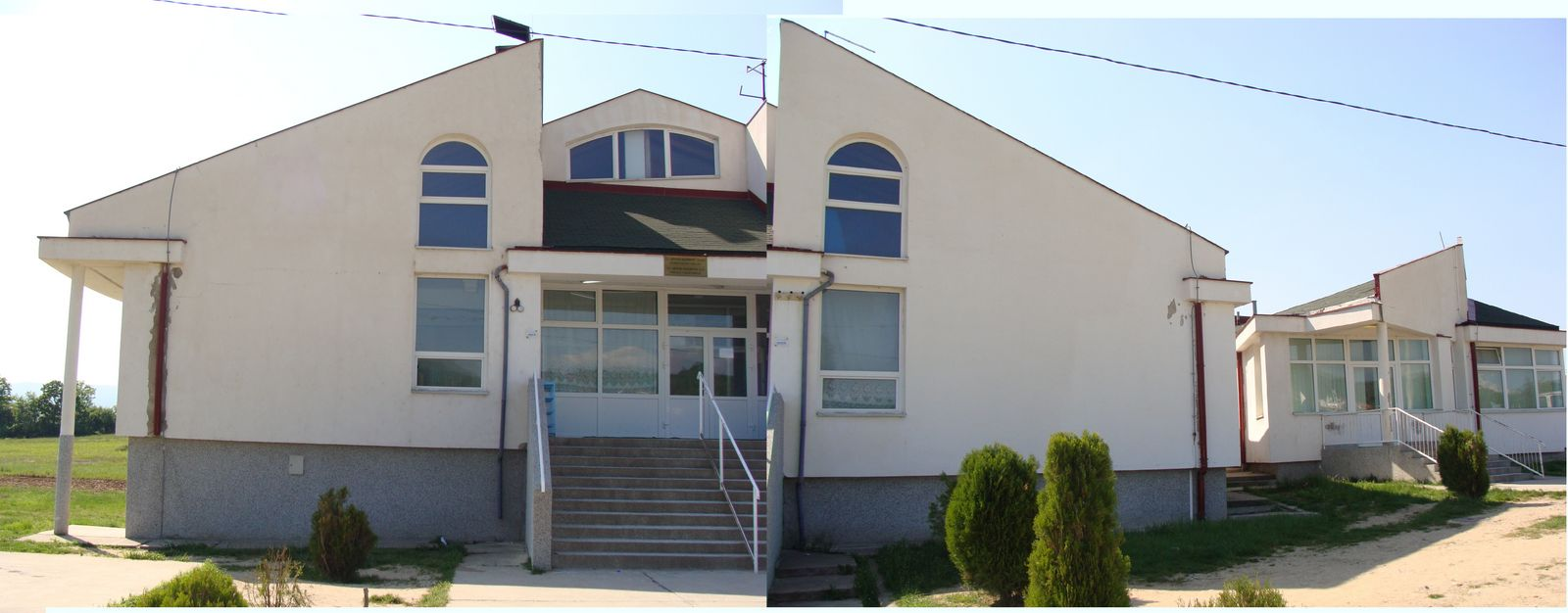 Shkolla Fillore e Fshatit Sumulicë "Skenderbeu"